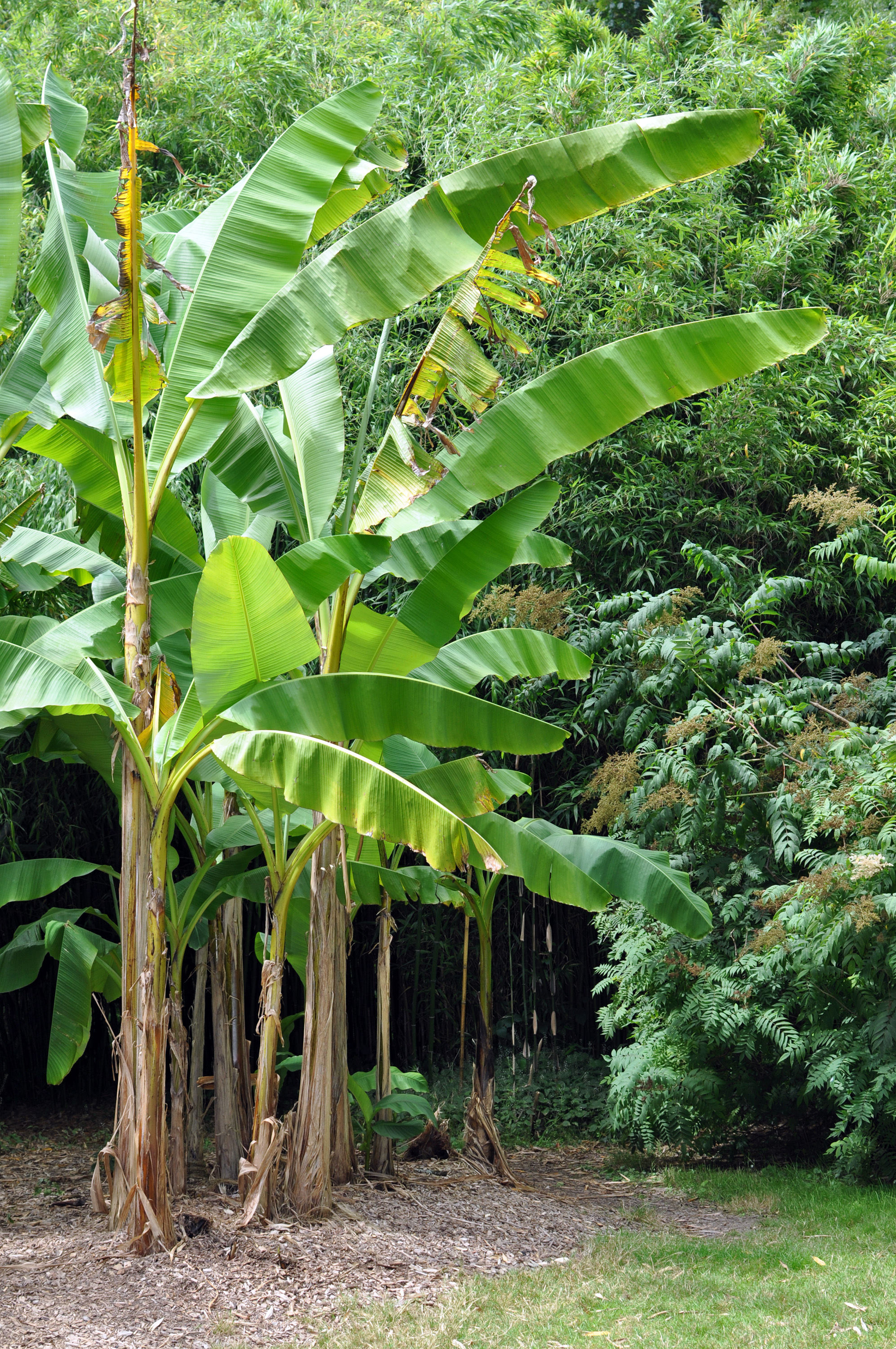 Musa acuminata at Conservatoire botanique national de Brest Conservatoire botanique national de Brest Native nameConservatoire botanique national de BrestLocationBrest, France, FranceCoordinates48° 24′ 10″ N, 4° 26′ 54″ W Established1975: established, 1978: opened to publicWebsite